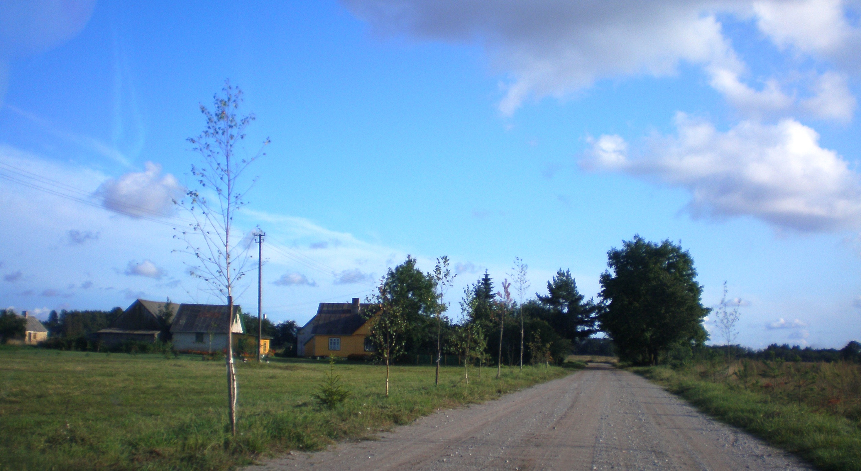 Ambraziūnai, Kėdainių raj., Lietuva